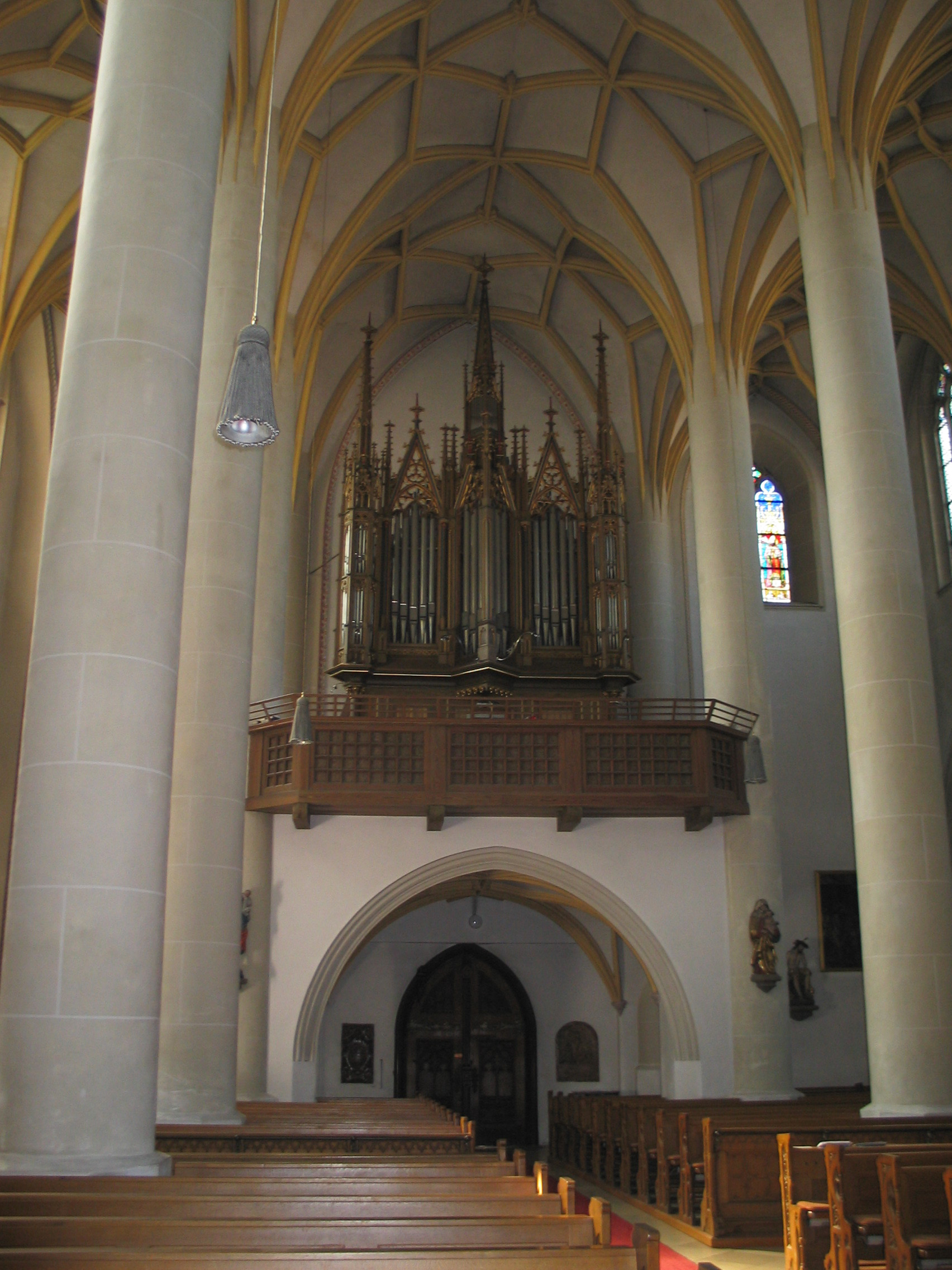 Dingolfing, Kath. Stadtpfarrkirche St. Johannes. Inneres gegen Westen.